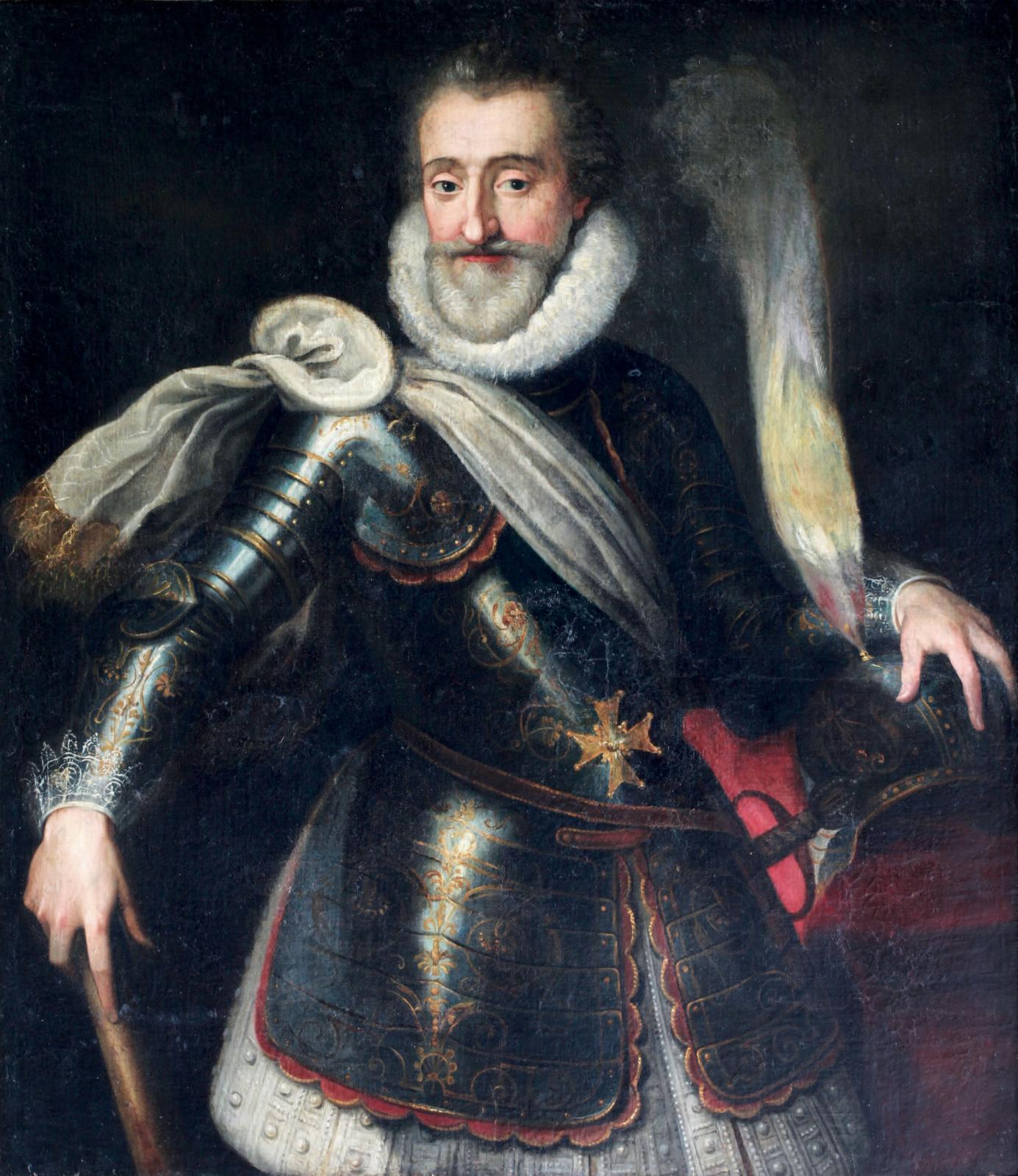 Portrait du roi Henri IV